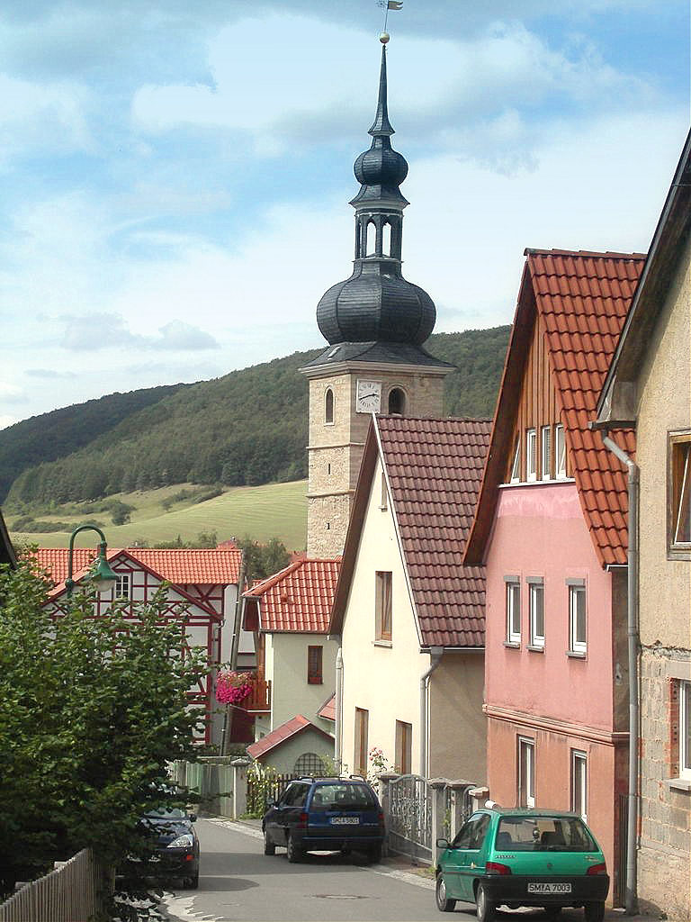 Dorfkirche Neubrunn